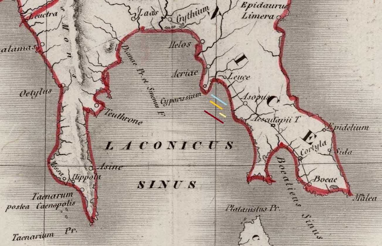 Batalha de Matapão IV ― Armada Otomana Vira em Roda (Esquema táctico simplificado) ―14h00: Quando volta a soprar uma aragem, a armada otomana vira em roda e aproxima-se das linhas cristãs. A batalha ganha intensidade, continuando a esquadra do Conde do Rio Grande a ocupar lugar de destaque, em luta com a vanguarda (depois de virar em roda a formar a retaguarda) turca. ― Vermelho: armada otomana. ― Azul: armada de remo cristã. ― Ouro: esquadras de Veneza. ― Branco: esquadra de Portugal. (Vento de SSW)